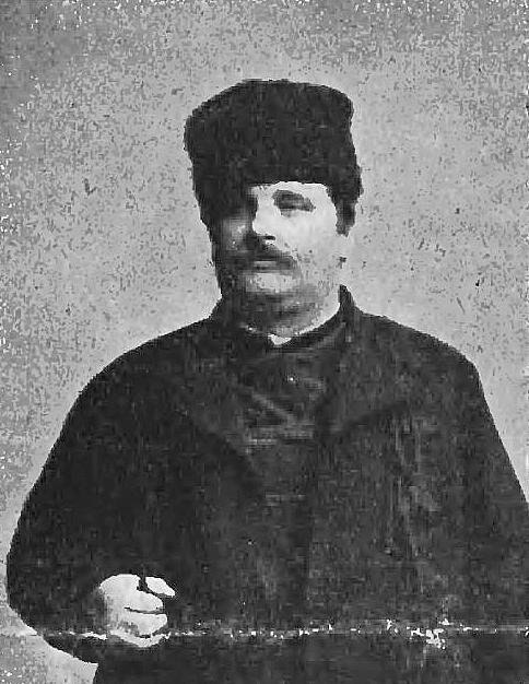 Tomasz Szajer (-1907)